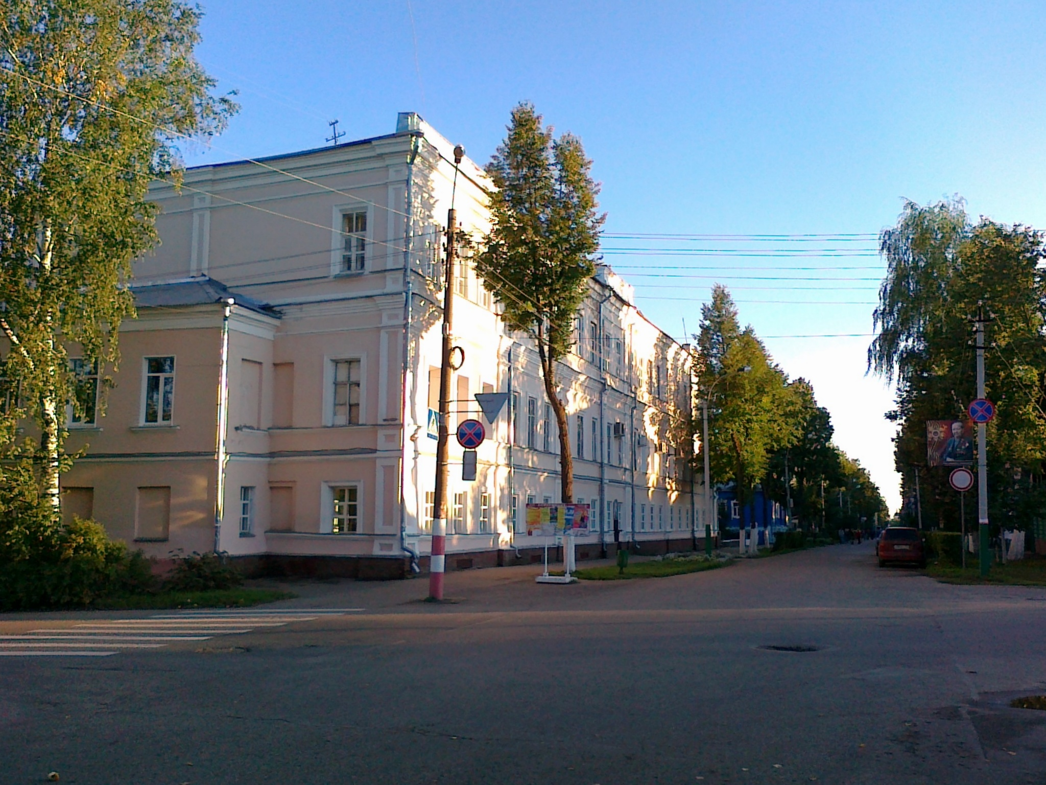 Arzamas state institute